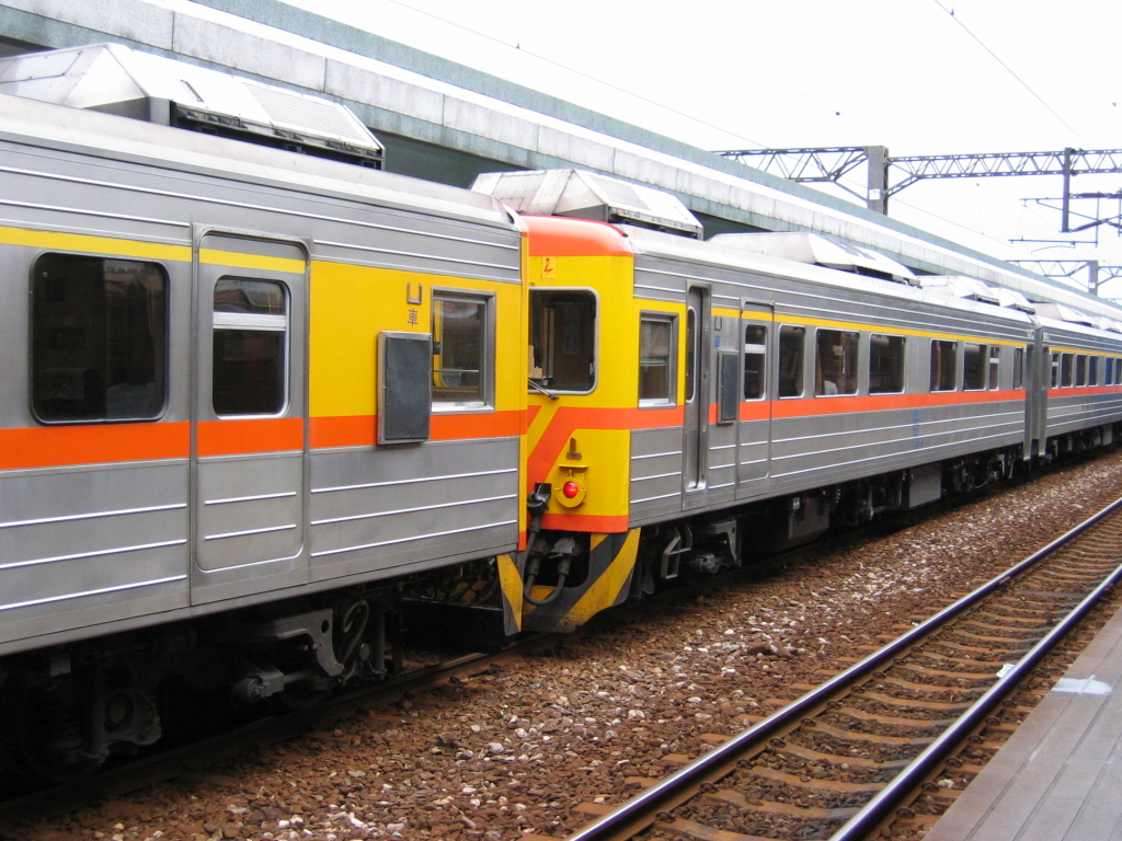 中文（台灣）: 臺灣鐵路管理局DR2900/DR3000柴聯車在花蓮車站。